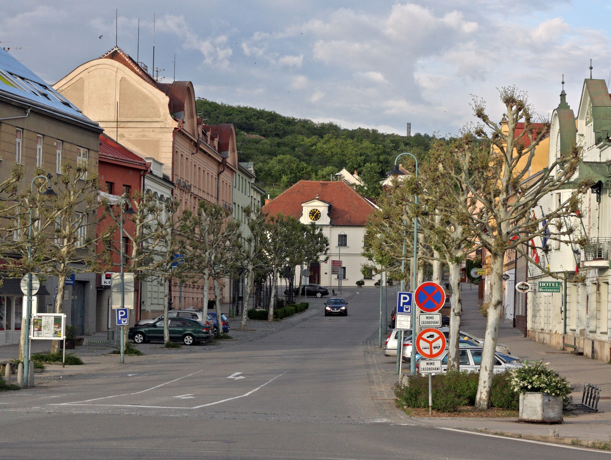 Židlochovice, pohled na náměstí Míru od mostu.